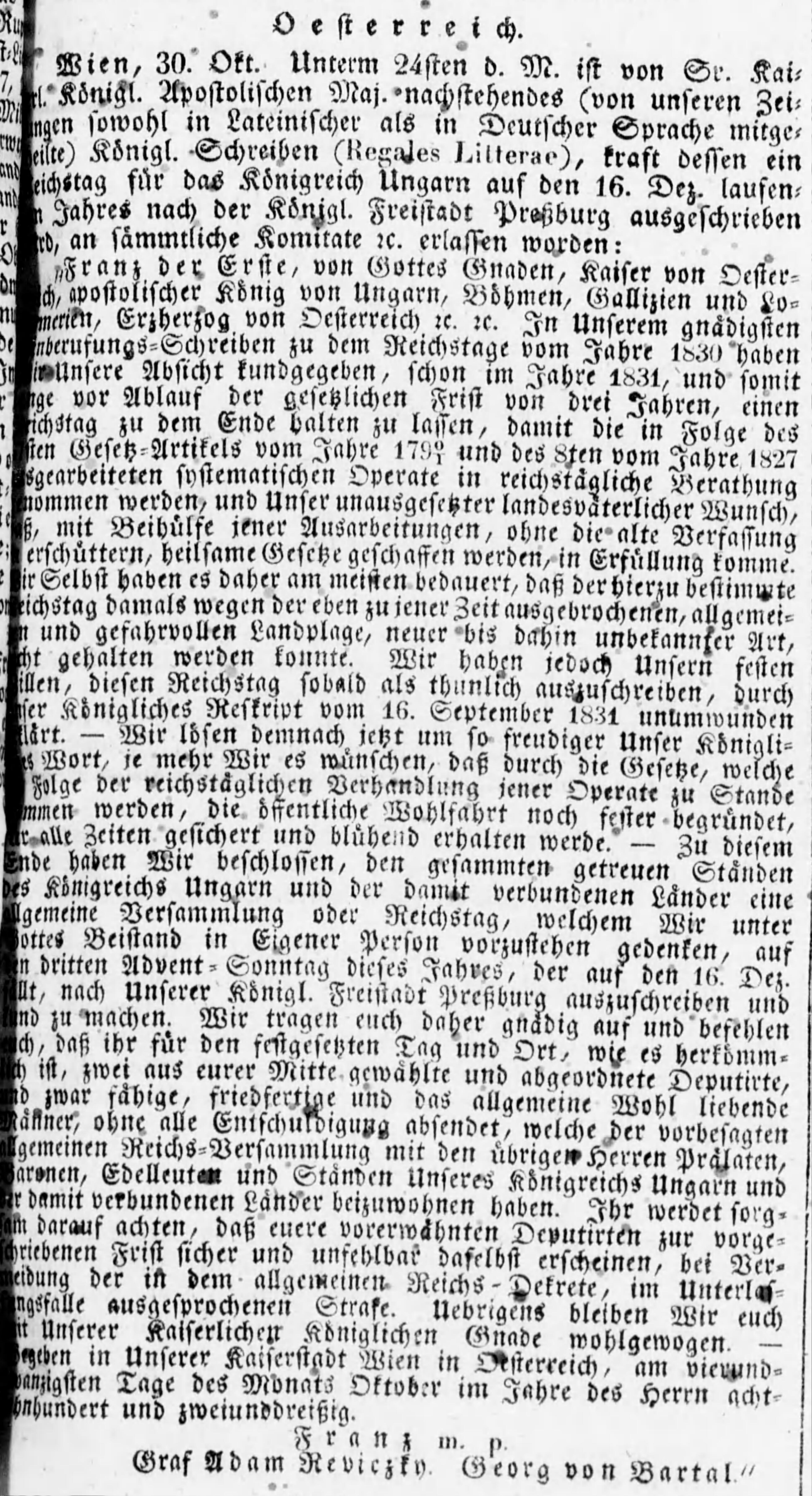 Aufruf zum ungarischen Reichstag 1832